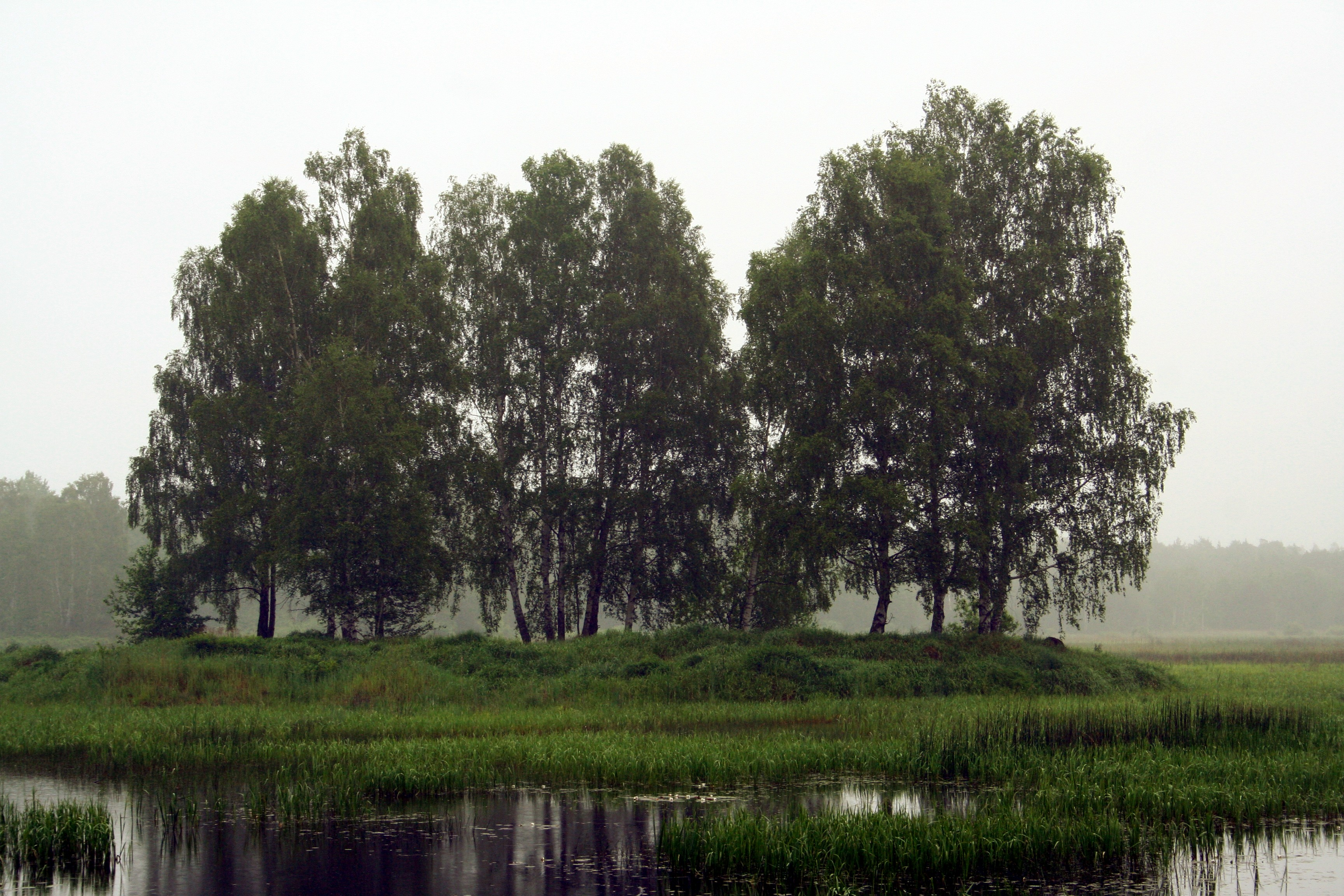 Staw_Brzoza, powiat lubliniecki